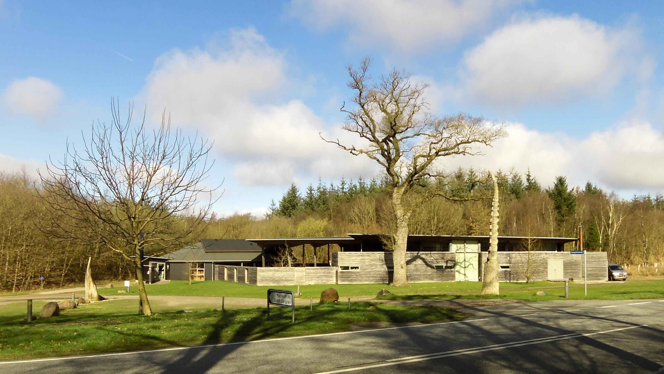 Palæontologisk museum ved Gram lergrav